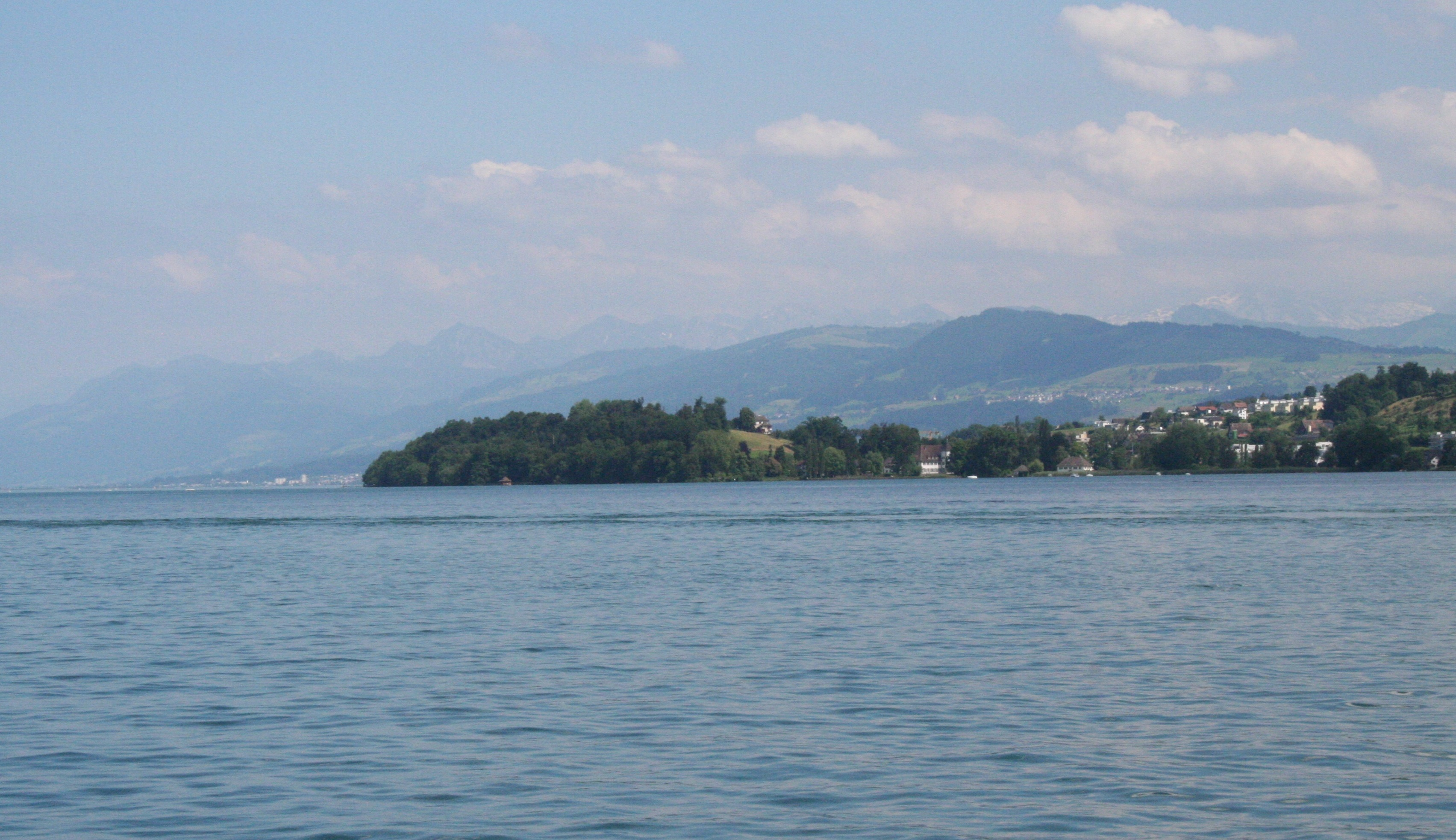 Halbinsel Au (Au peninsula) von Nordwesten